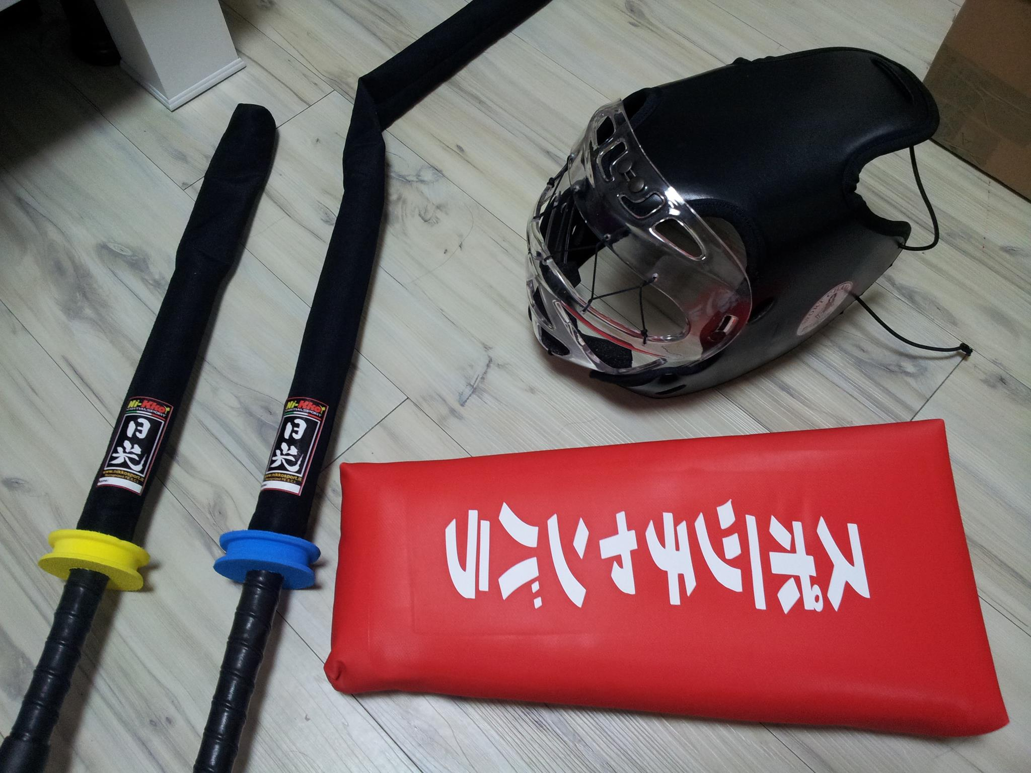 이탈리아산 스포츠 찬바라 장비